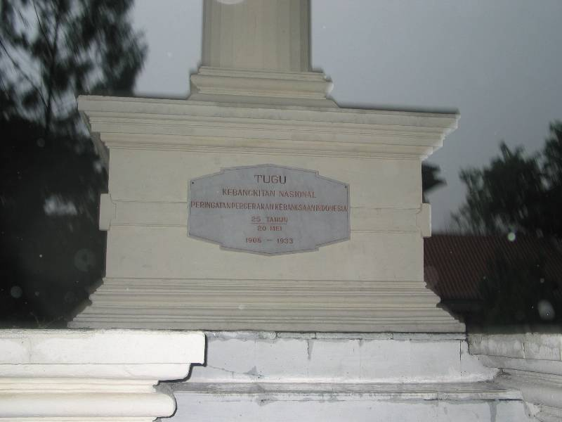 Monumen of National Awakening